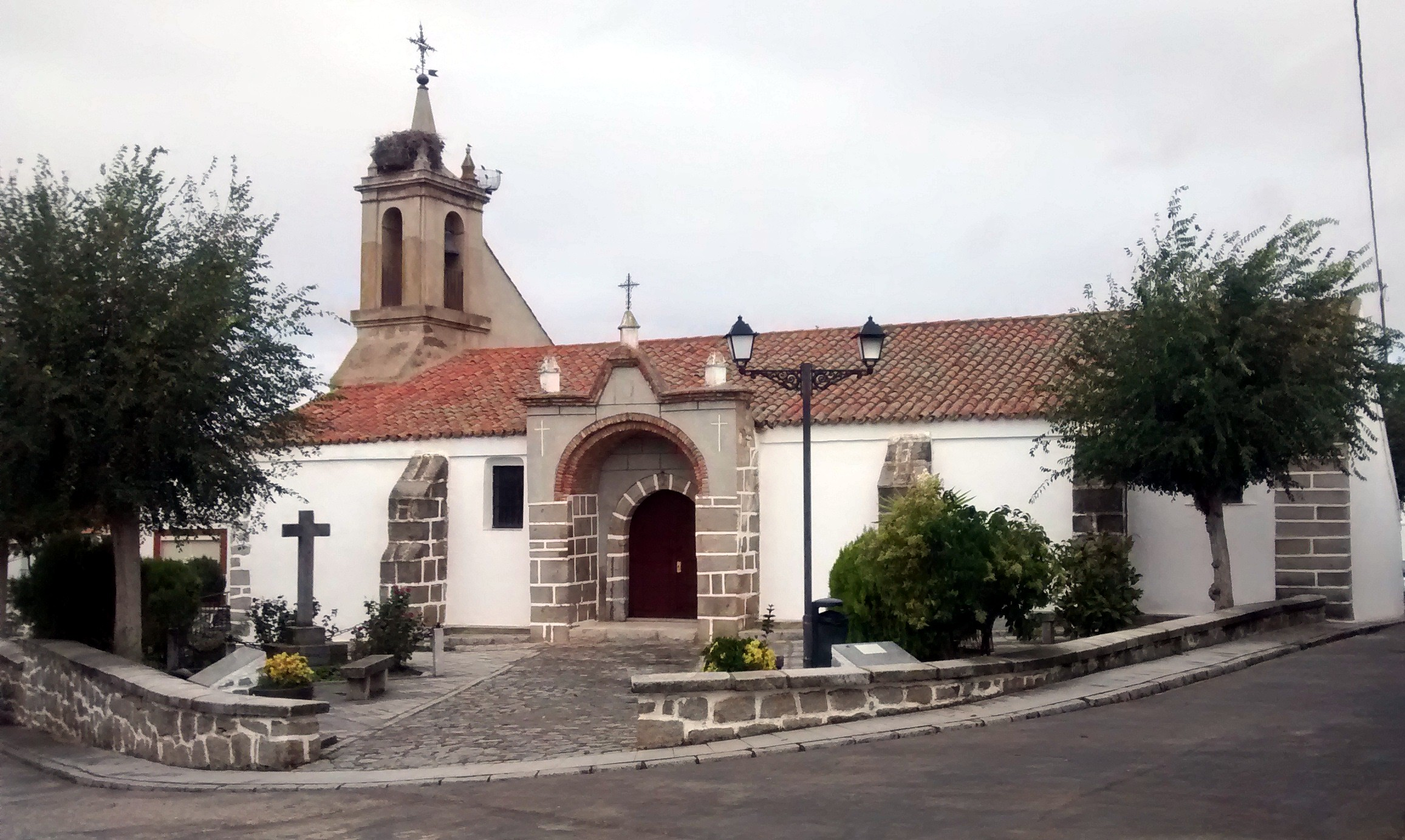 Iglesia parroquial de Santa Catalina en Fuente la Lancha (Córdoba, España). Siglo XVI